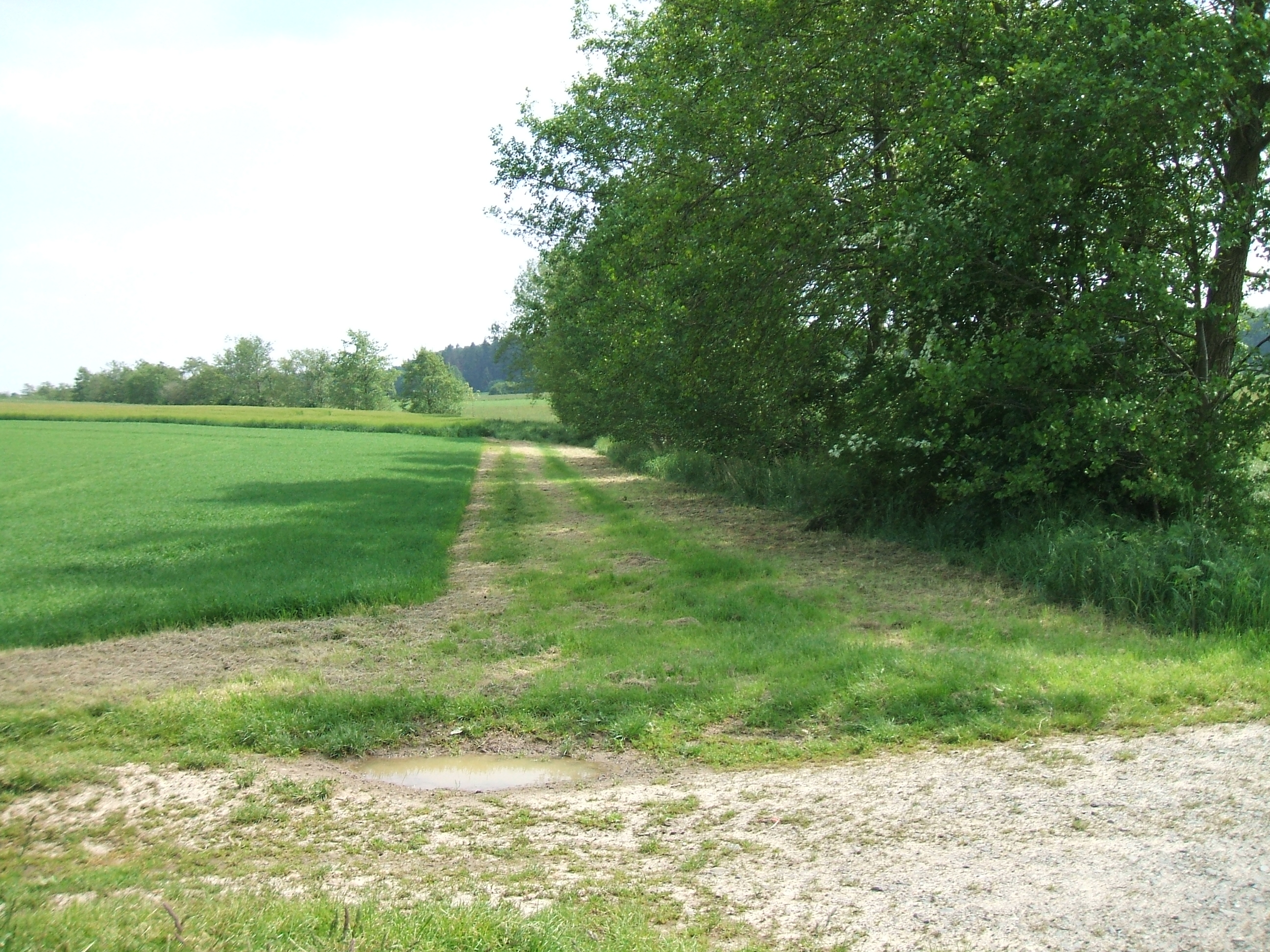 Blick den Hainbach aufwärts von einem unbefestigten Feldweg bei km 1,45